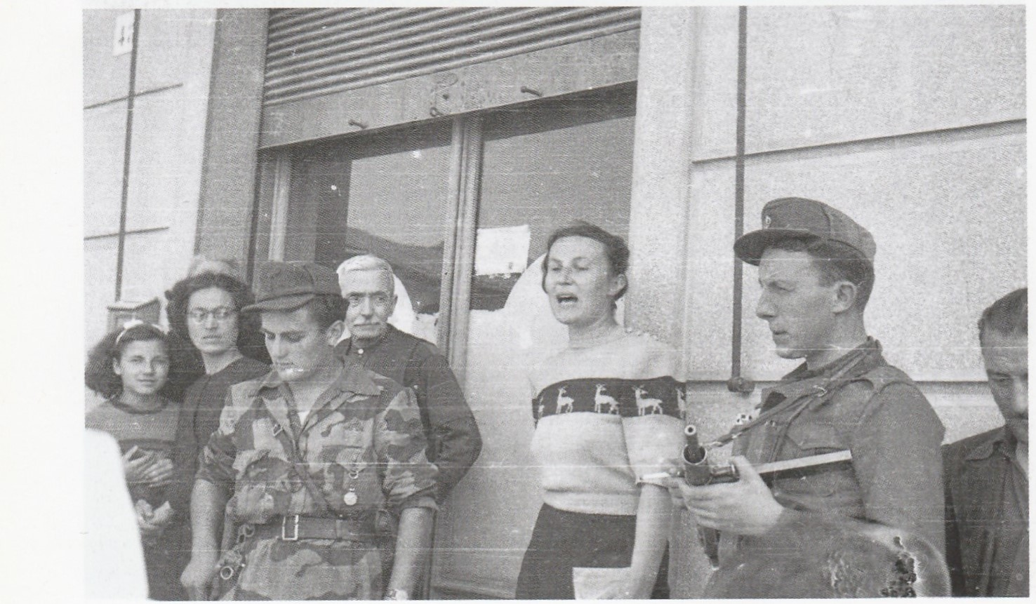 Anna Marengo nel comizio tenuto a Lessona nella primavera 45